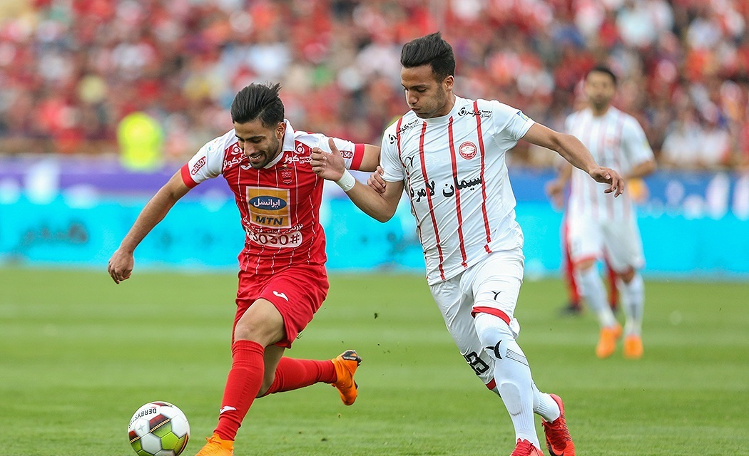 دیدار تیمهای فوتبال «پرسپولیس و سپید رود» عصر جمعه ۷ اردیبهشت ۱۳۹۷ در ورزشگاه آزادی تهران